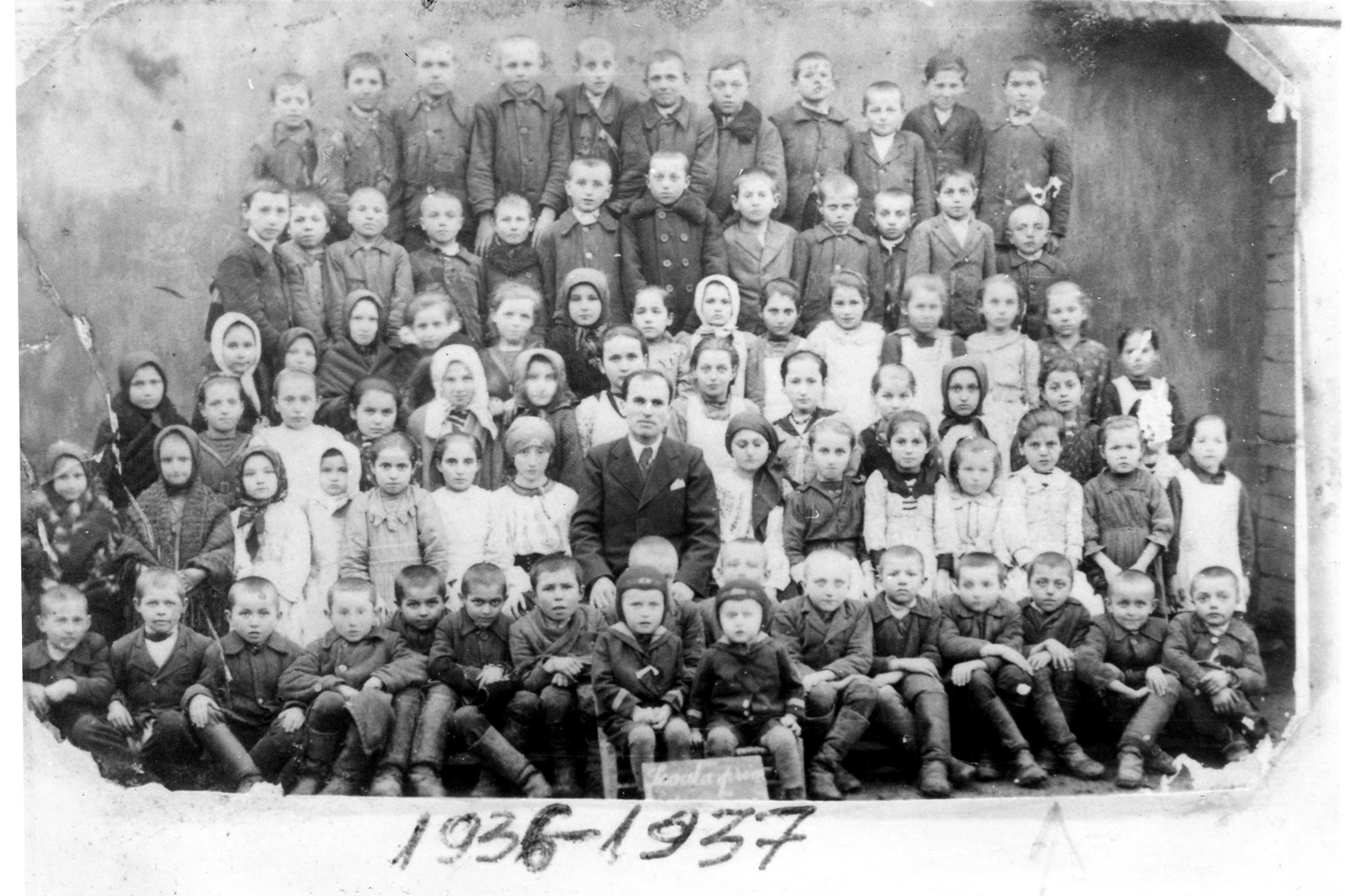 Elevii școlii din Margine în anul școlar 1935-1937